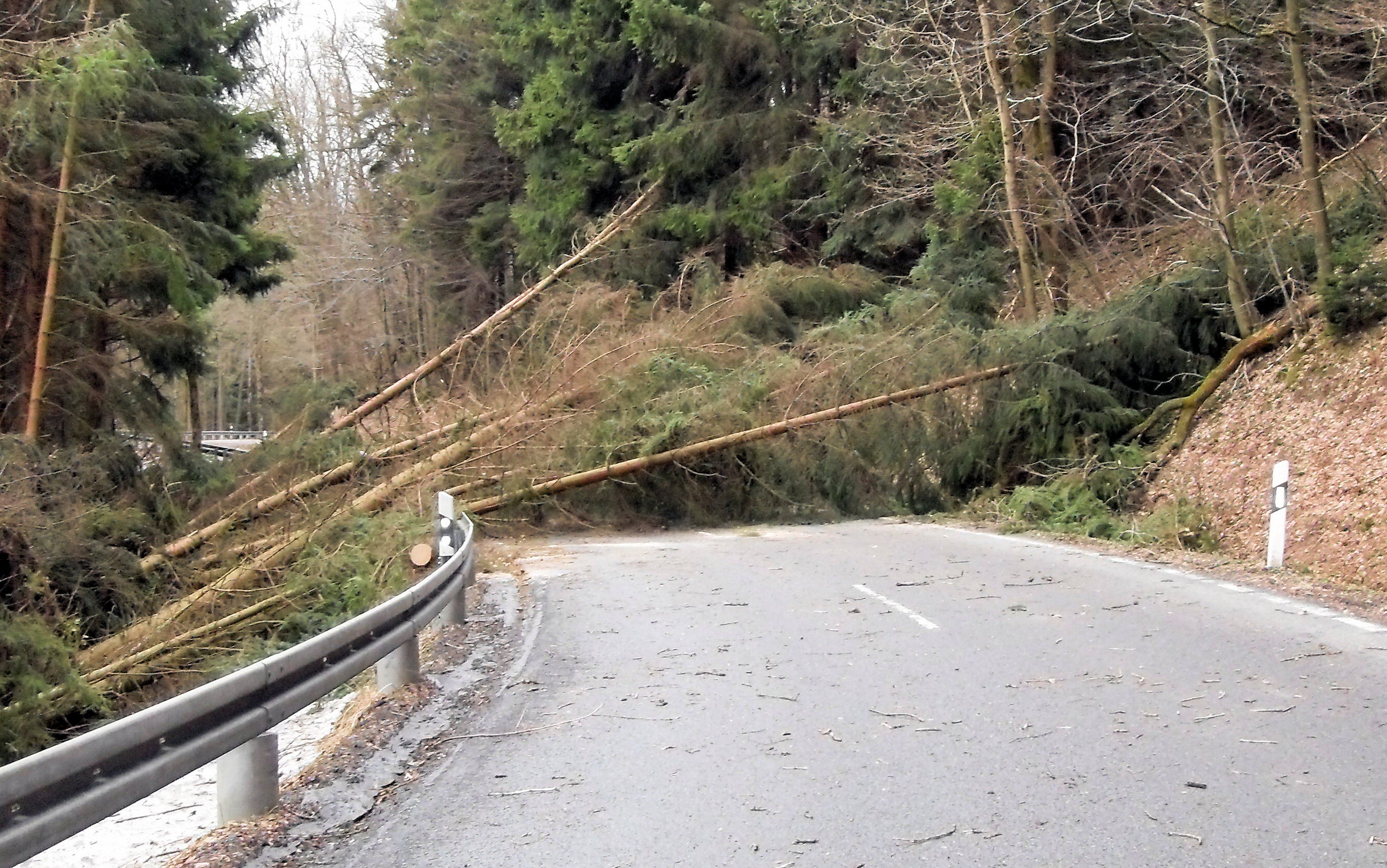 Sturmschäden des Orkans Xynthia an der B 256 südlich von Spurkenbach, Stadt Waldbröl, Deutschland